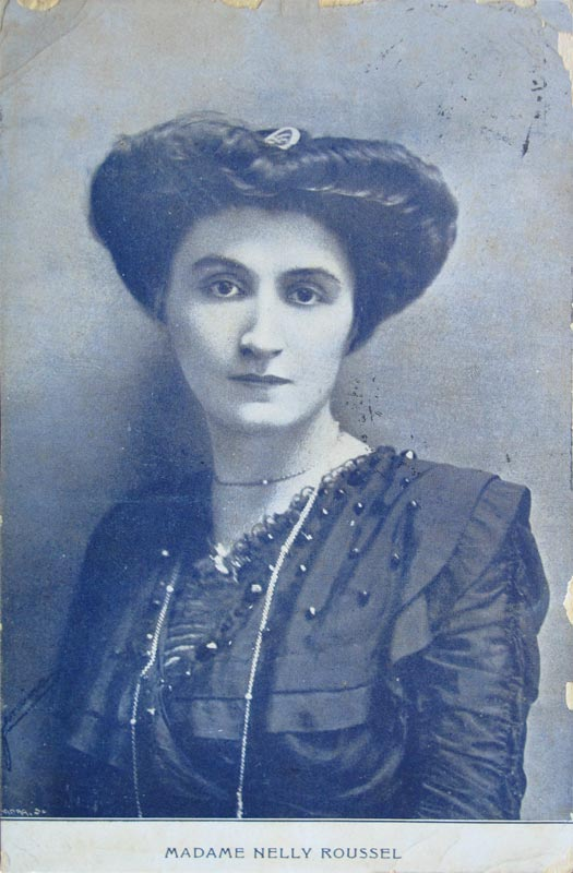 Nelly Roussel, née le 5 janvier 1878 et morte le 18 décembre 1922, est une libre penseuse féministe, antinataliste, néomalthusianiste et anarchiste française.